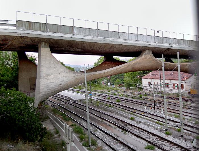 Ponte Musmeci, Potenza (Italia)